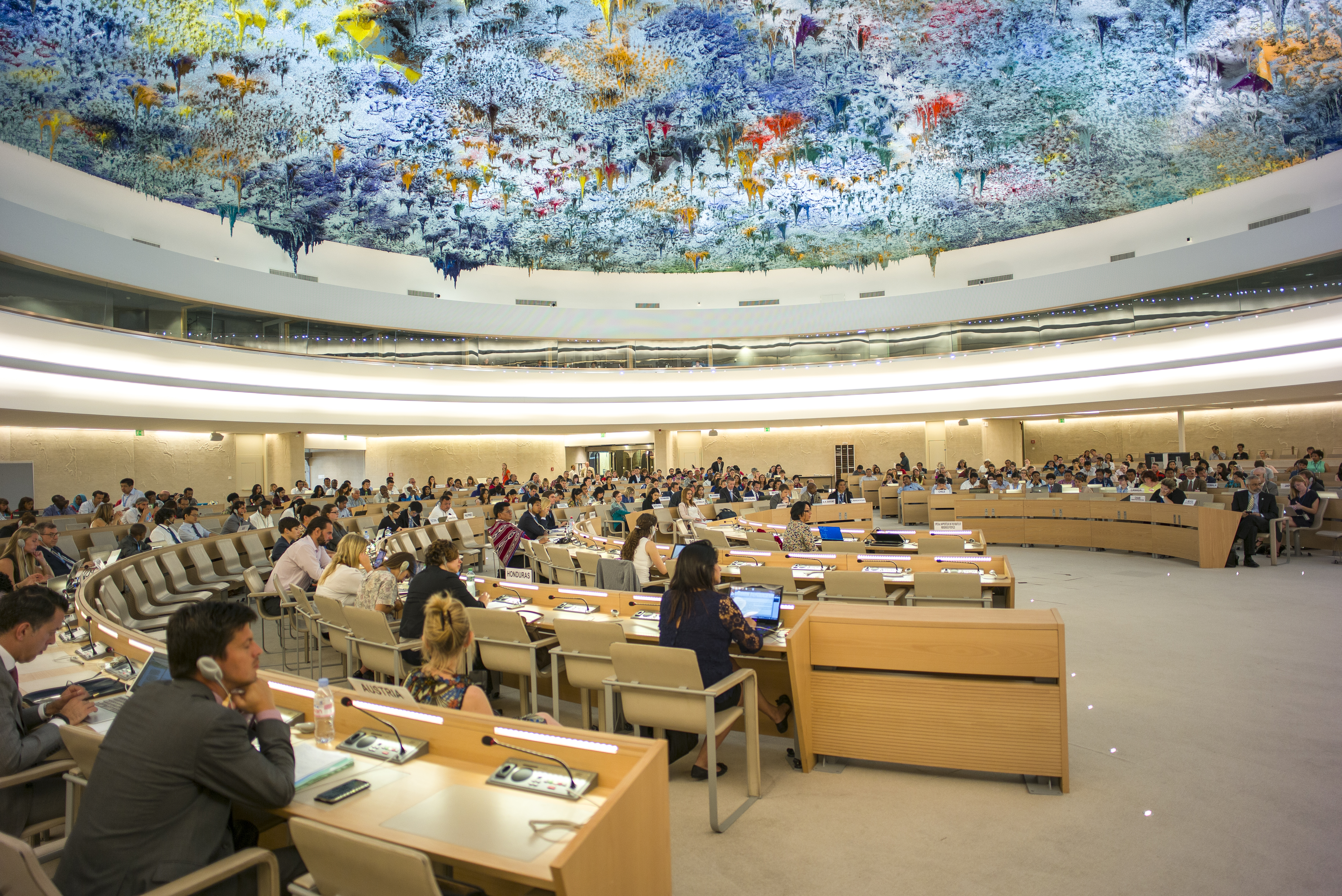 Session pendant le MEDPA 2015 dans la salle du Conseil des Droits de l'Homme à Genève. Photographe: Maxime Fossat